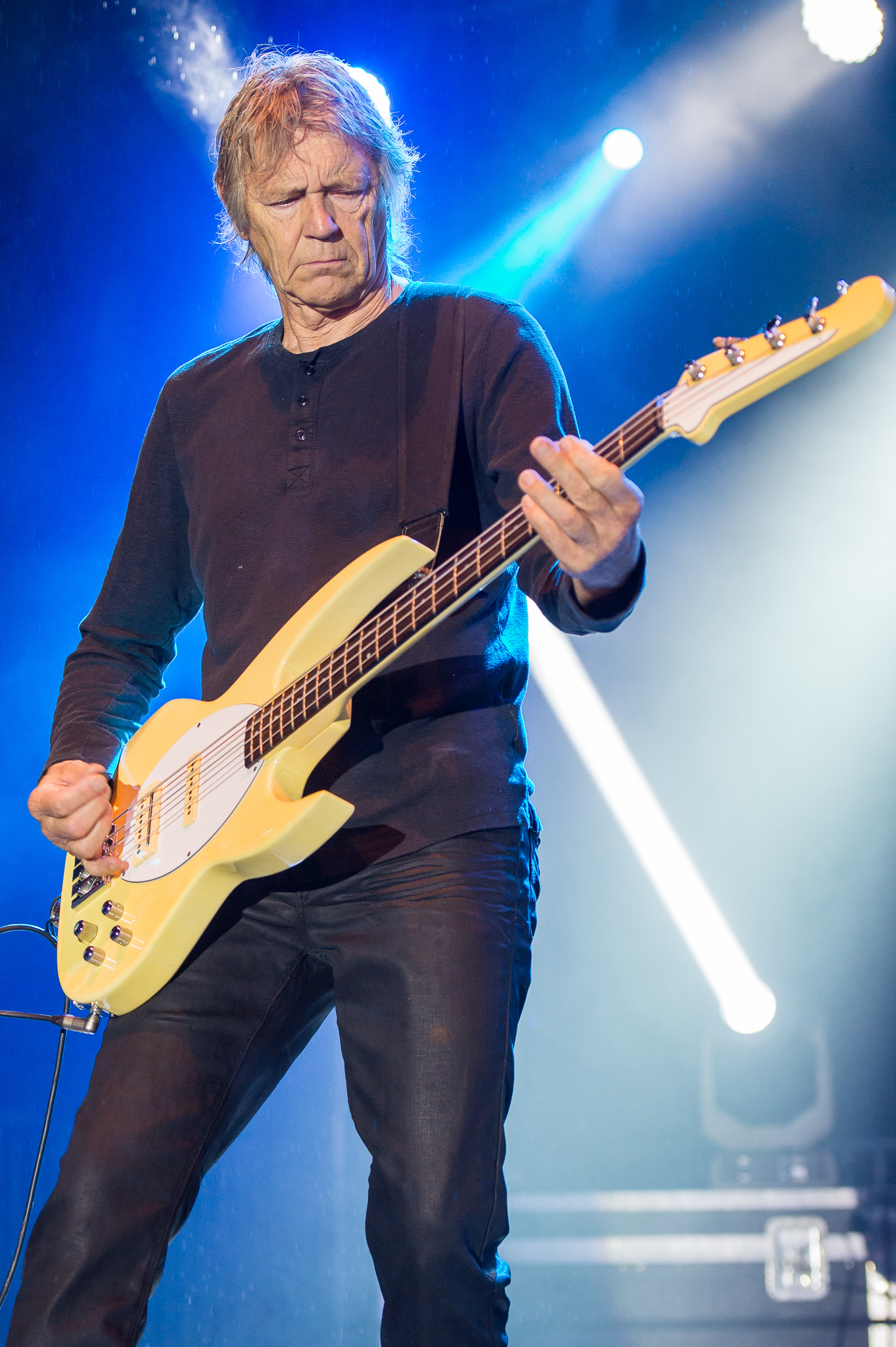 Concertbüro Franken,Festival,Golden Earring,Konzert,Lieder am See,Livekonzert,Livemusik,Musik,Rinus Gerritsen